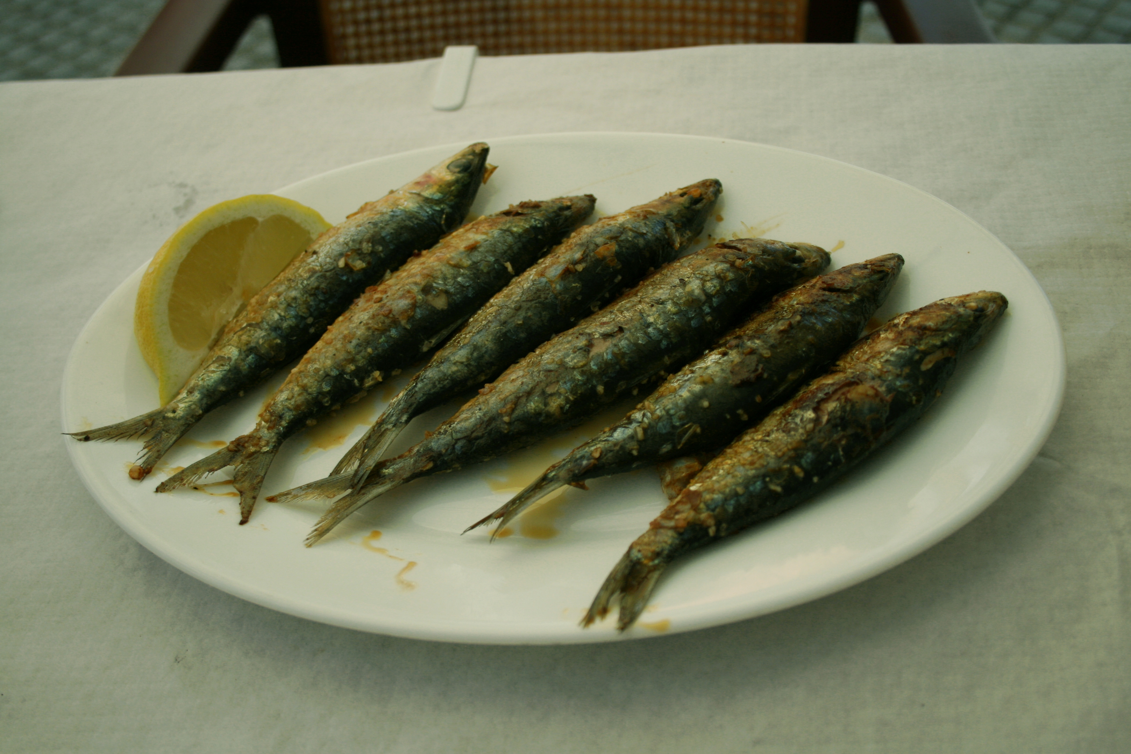 Sardinas a la plancha - en temporada alta - Cádiz